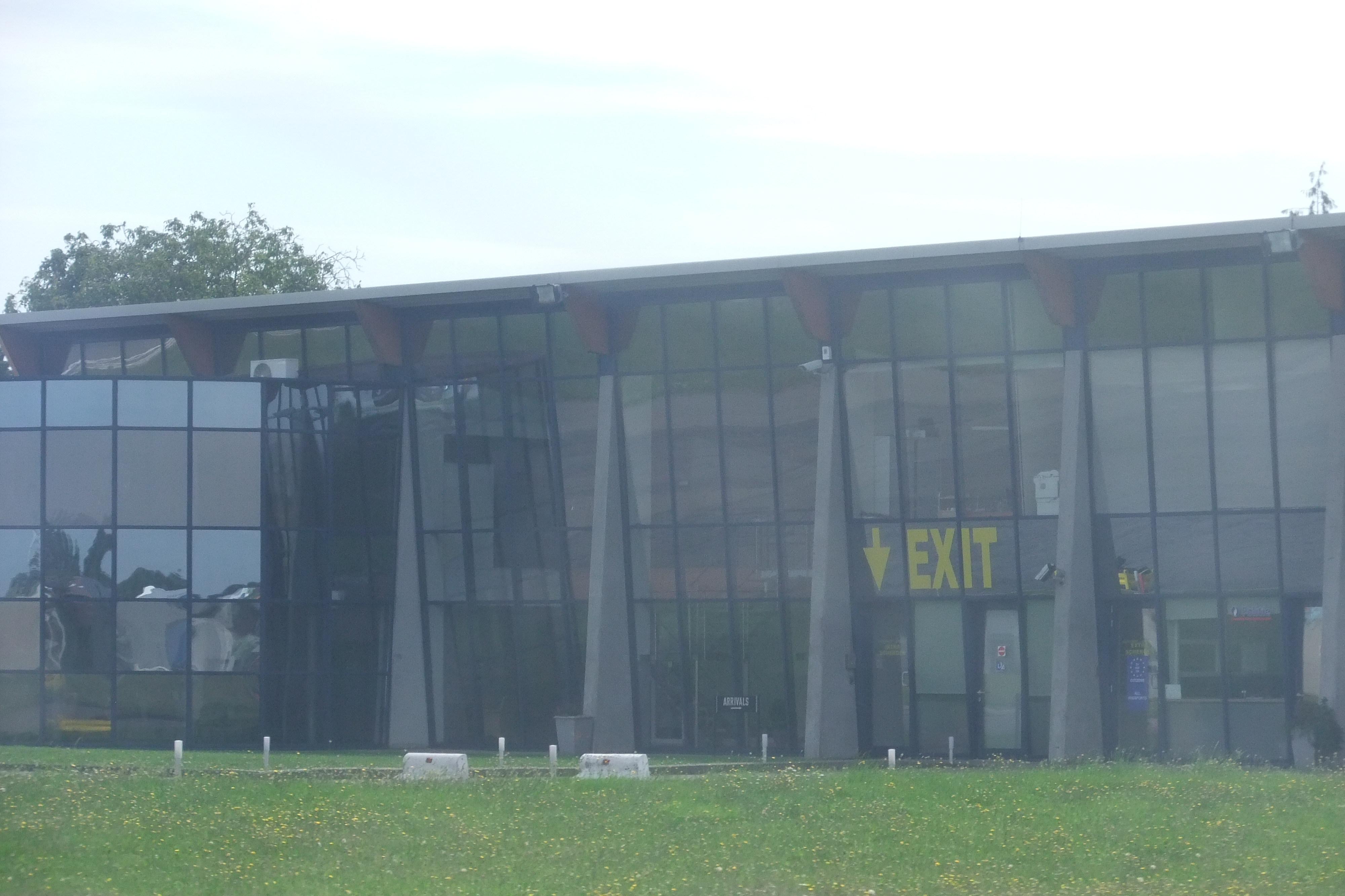 Luchthaven Kortrijk - terminal